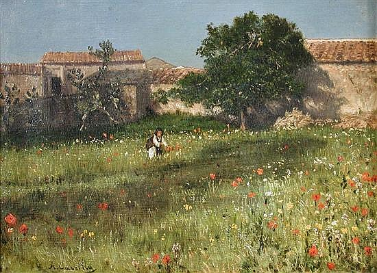 Prato di fiori selvatici, olio su tela, 25 x 36 cm., firmato, coll. privata